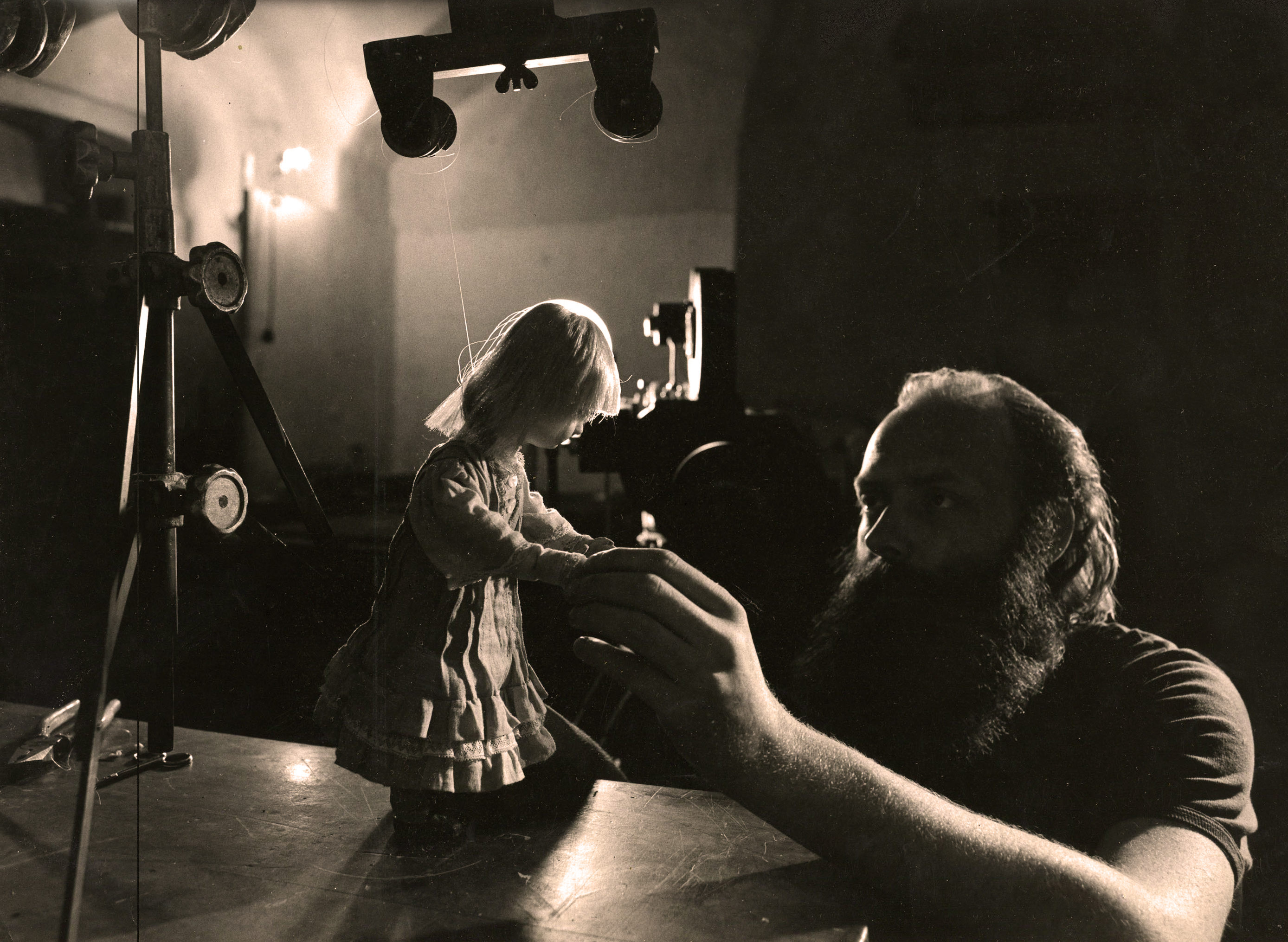 Animace loutky panenky do filmu Něco z Alenky